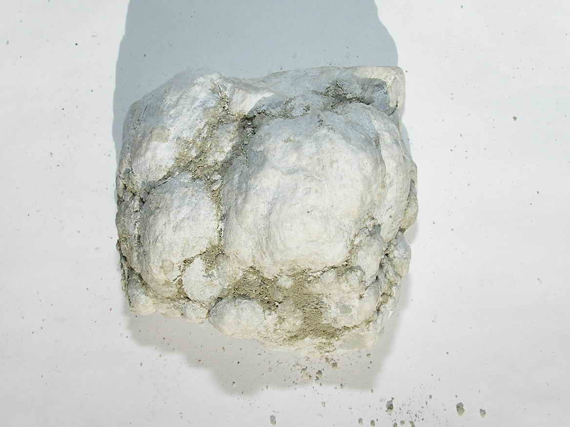 Anhydrita